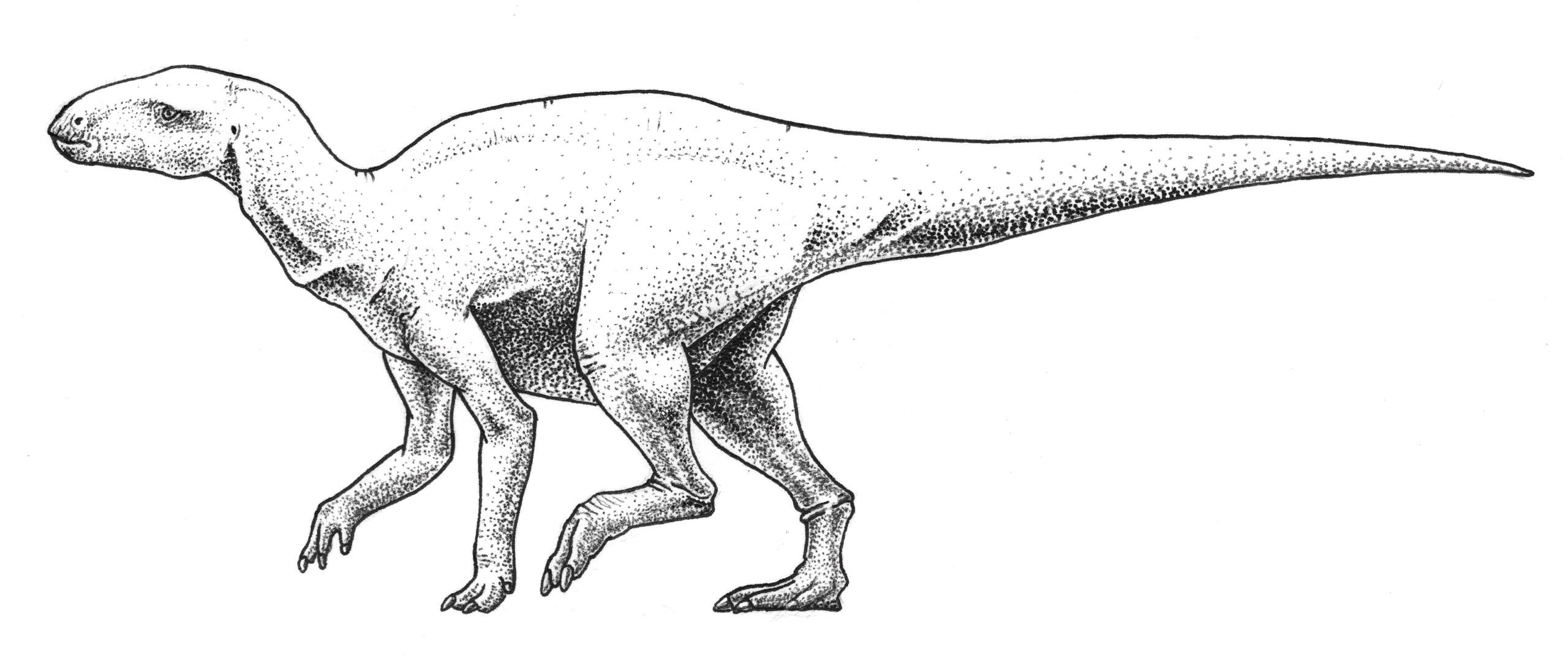 Рабдодон